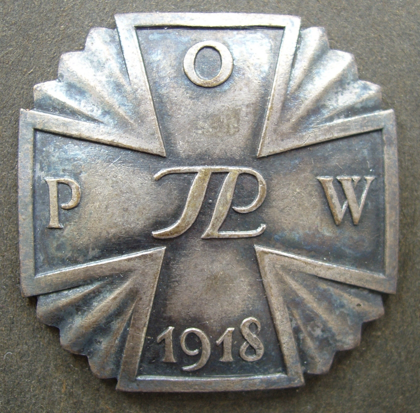 Odznaka pamiątkowa Polskiej Organizacji Wojskowe